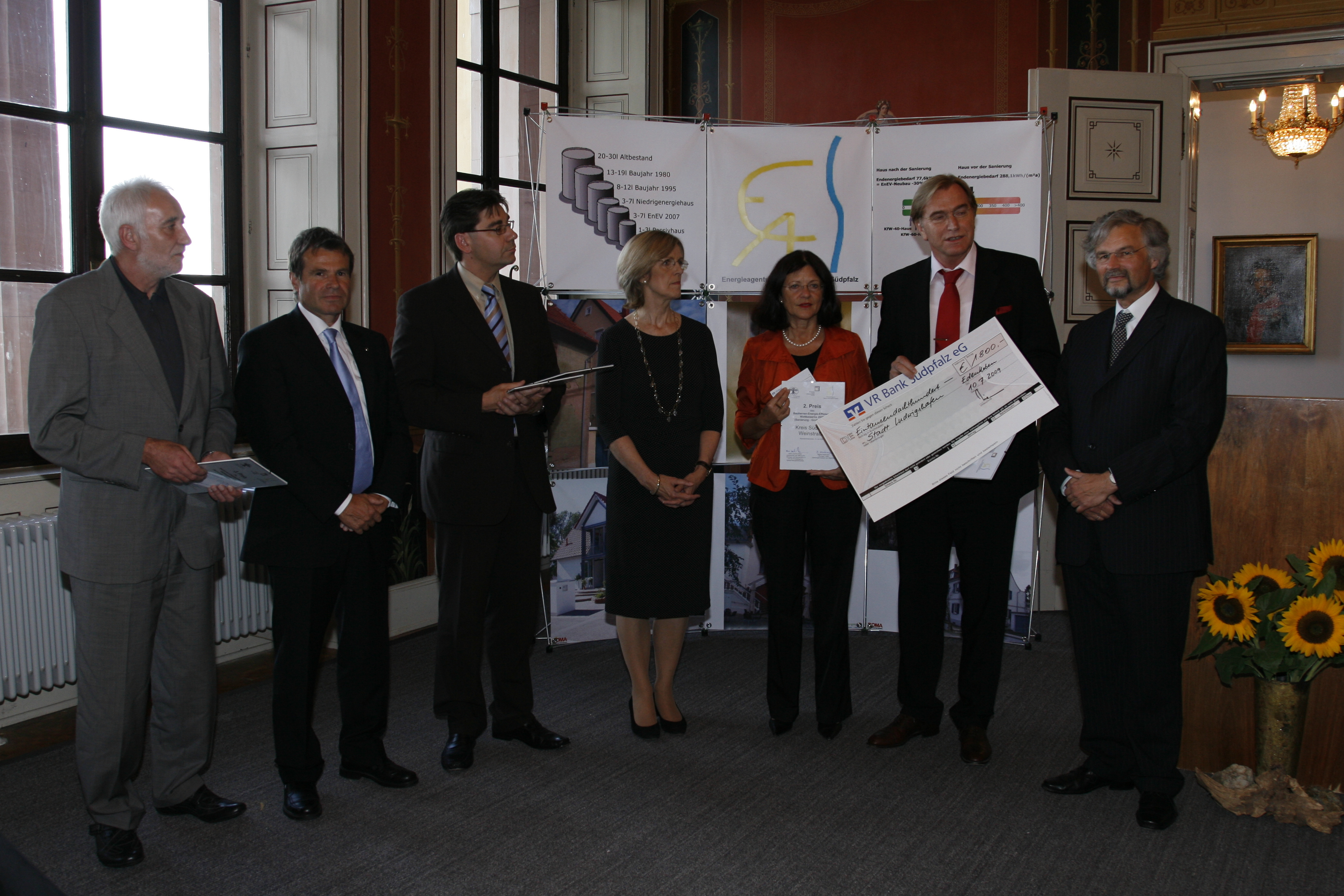 Veranstaltung im Rahmen der Preisverleihung der "Green-Building-Initiative"